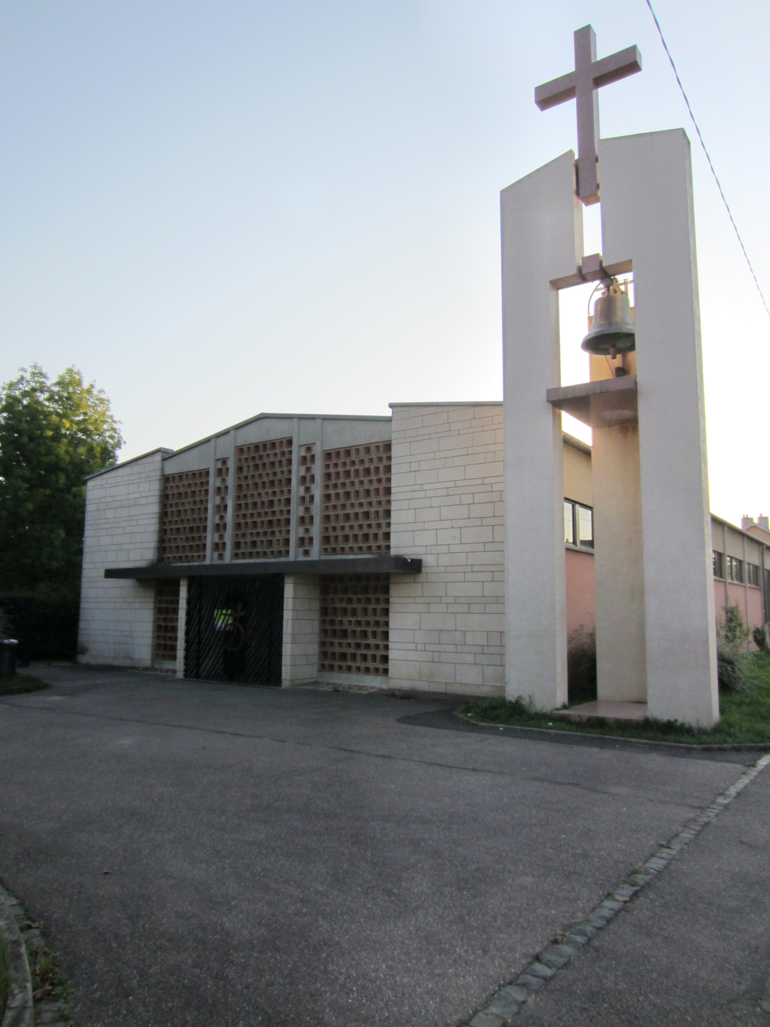 Metz Eglise Saint-François-d'Assise